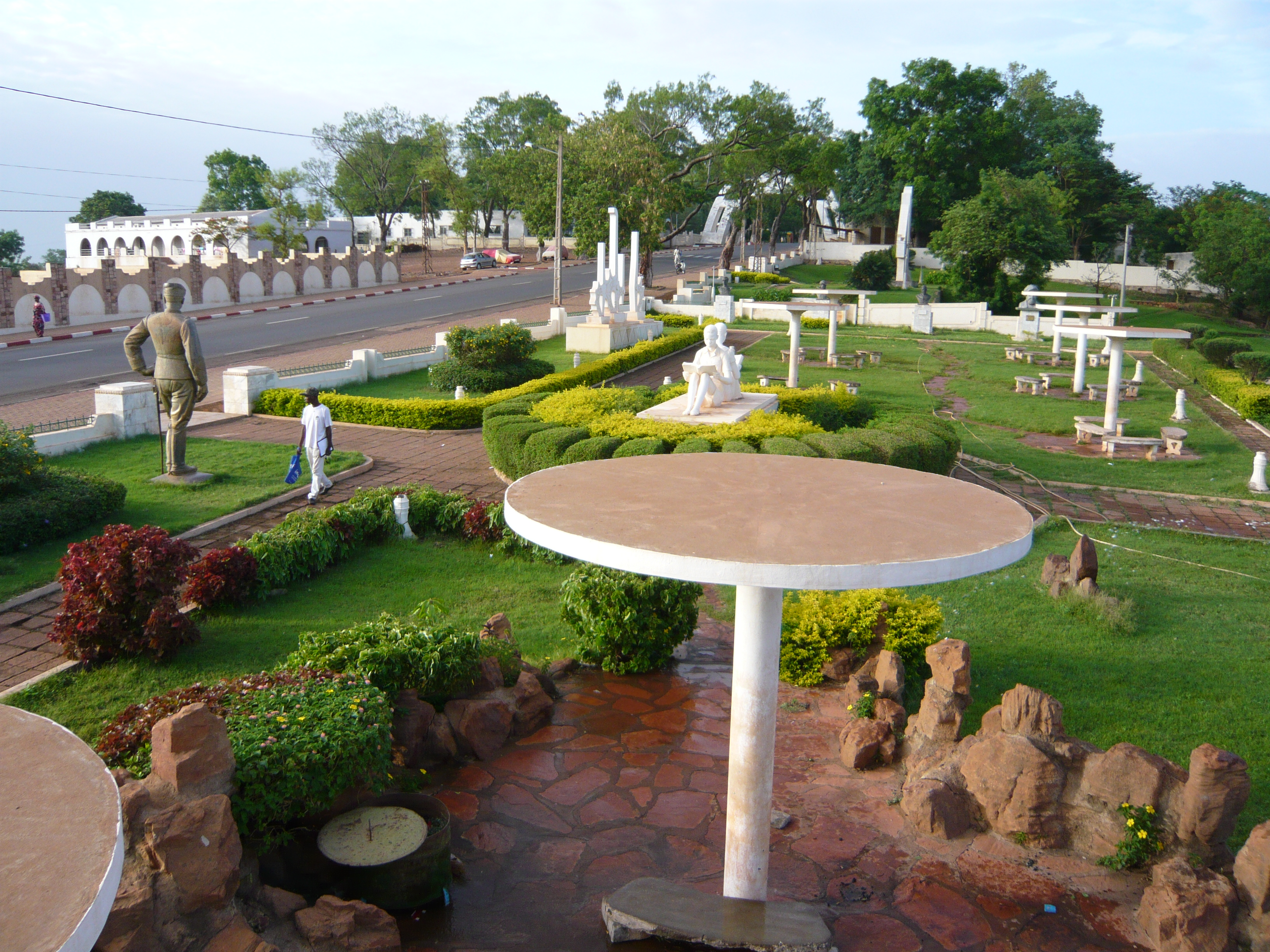 Place des explorateurs, Koulouba - Bamako, Mali